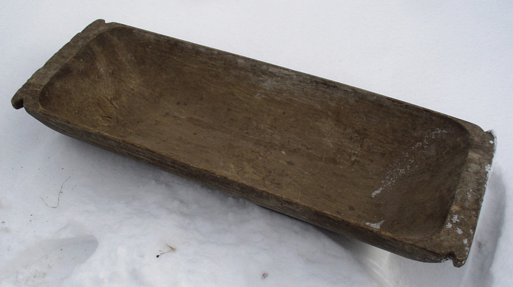 Деревянное корыто, изготовленное из осины